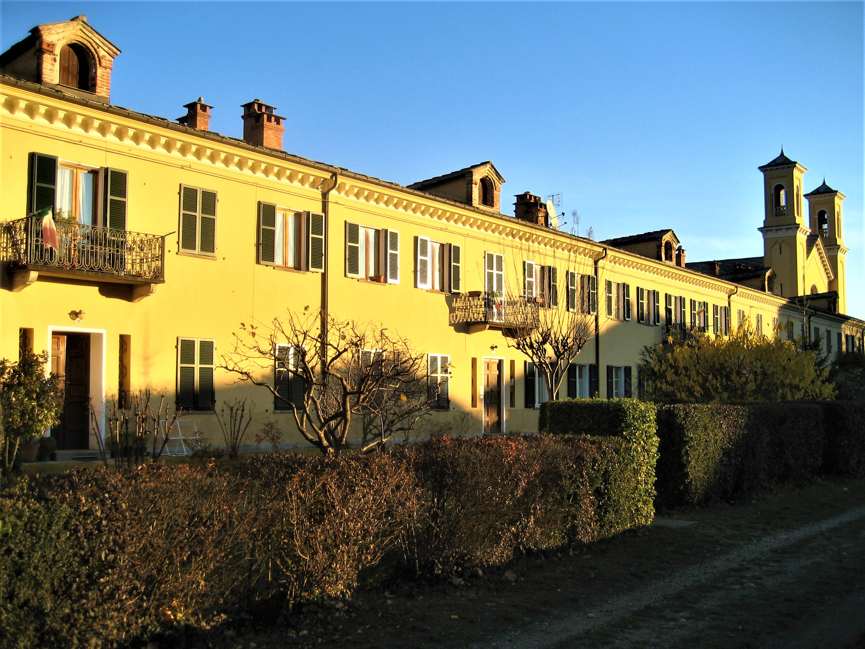 Waldenserkirche und -seminar Torre Pellice